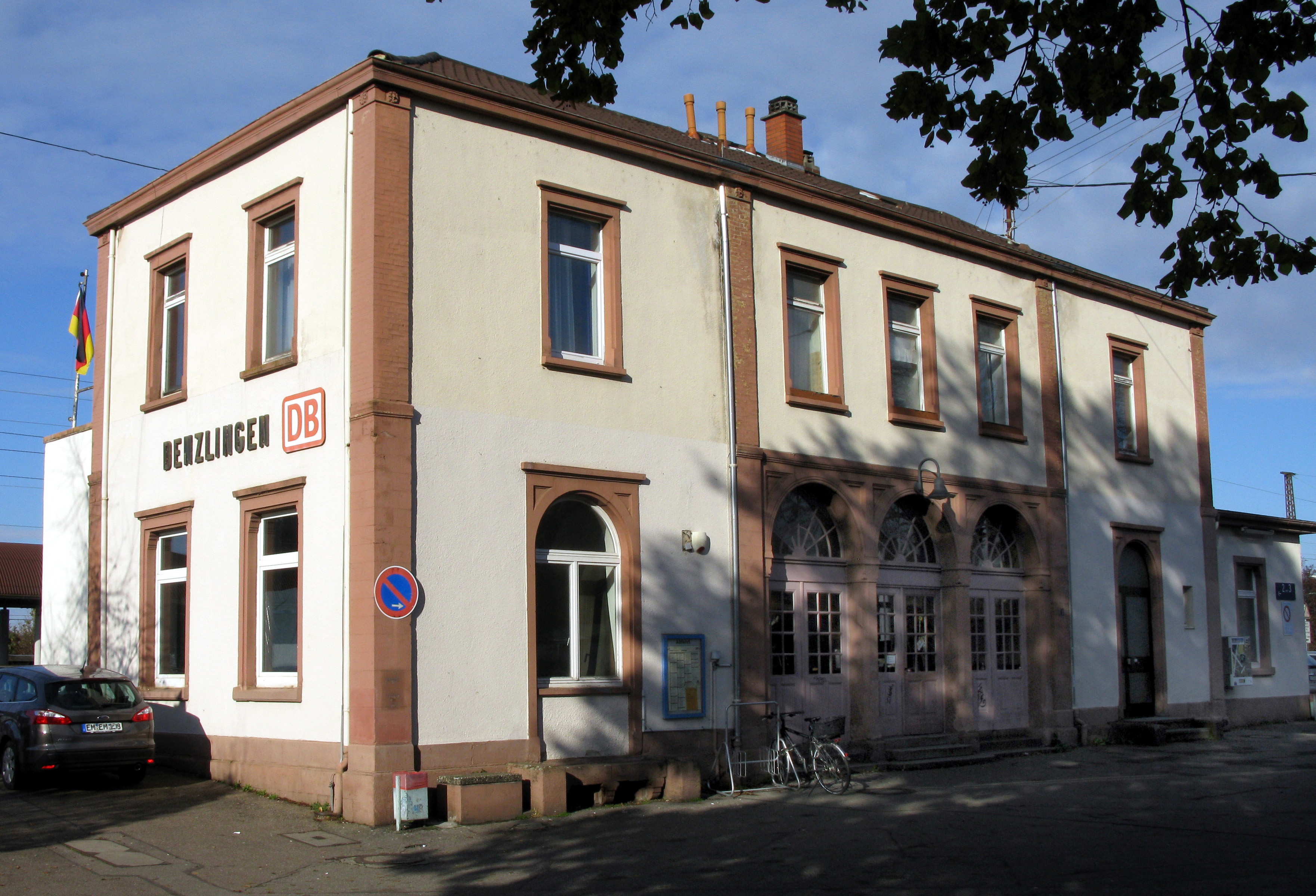 Denzlingen, Bahnhofsgebäude von 1864 von Friedrich Eisenlohr